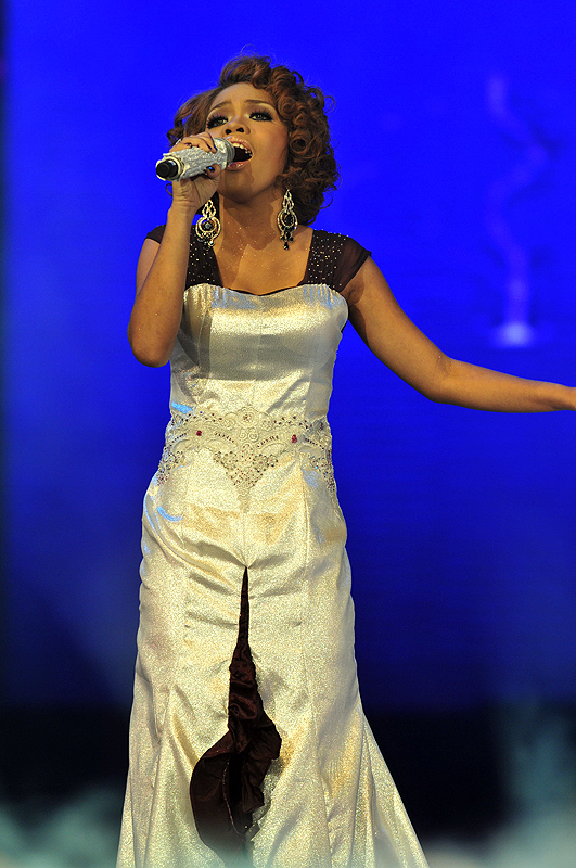 Ayu membuat persembahan di peringkat akhir Anugerah Juara Lagu ke-23 (2009)